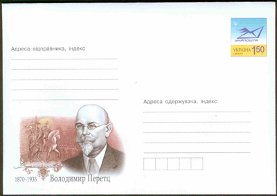 Володимир Перетц конверт: Конверт на честь 140-річчя Володимира Перетца